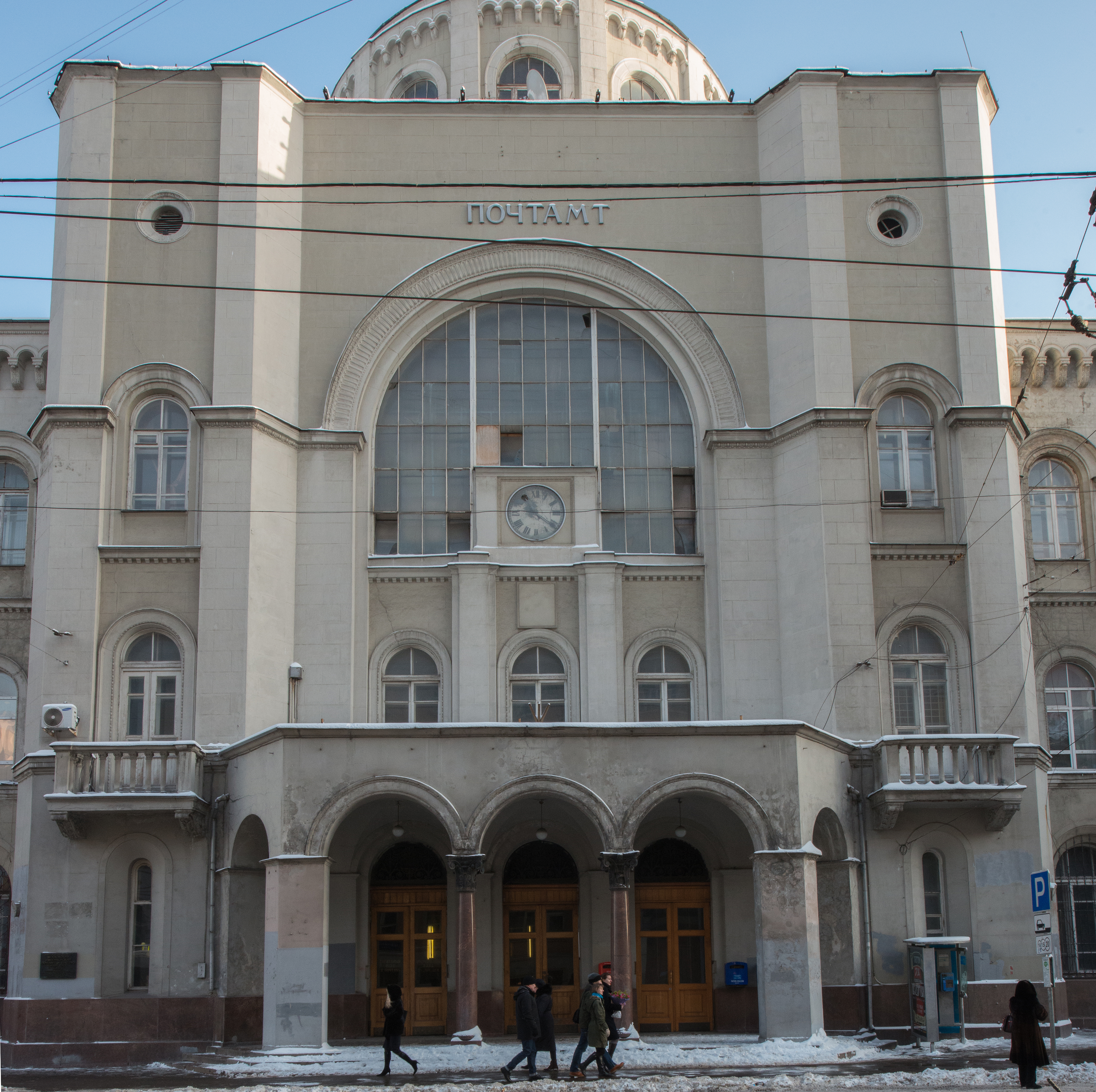 Московский Императорский почтамт и телеграф: Мясницкая ул., дом 26А, строение 1, Басманный, Центральный округ, Москва